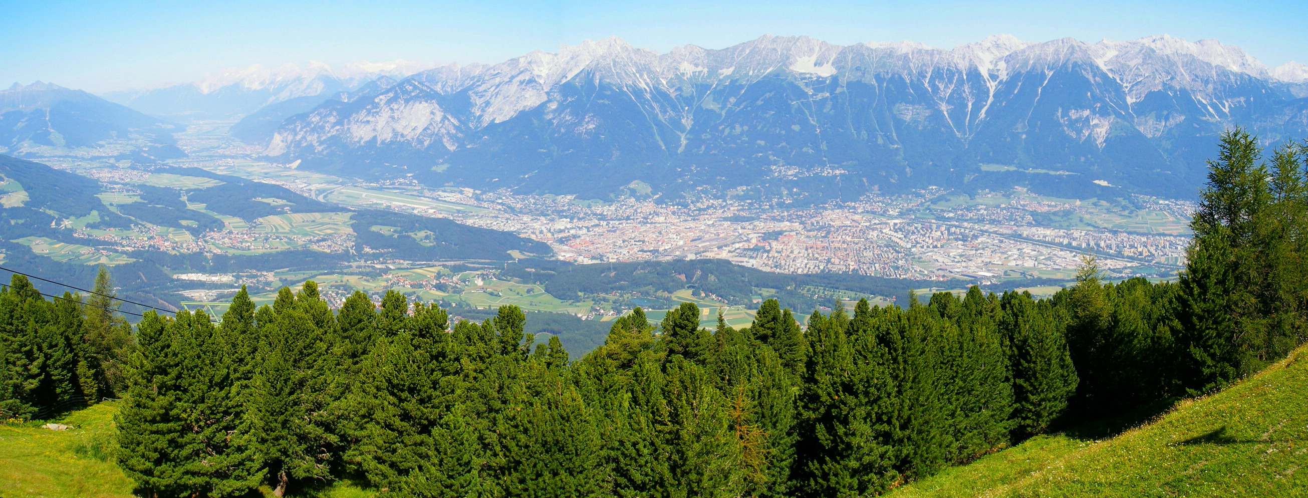 Innsbrucker Tal panorama